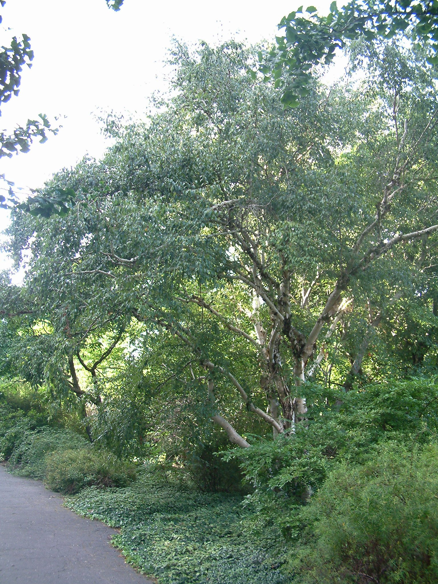 Betula albosinensis var. septentrionalis, Botanical Garden in Poznań